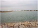 آب بندان شماره2